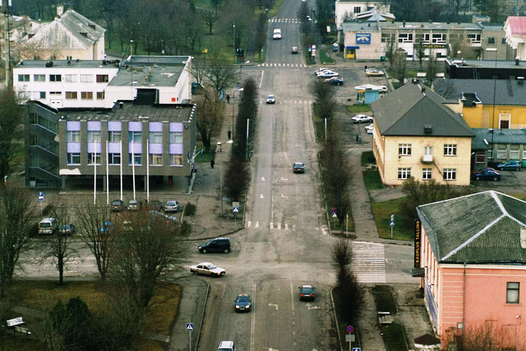 Vana foto Keilast.